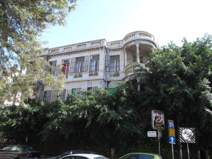 בניין השומר הצעיר ברחוב בצלאל יפה פינת אחד העם.